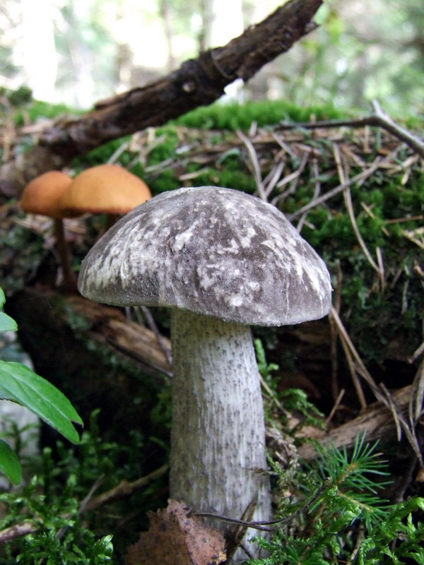 Leccinum variicolor. Karmėlava forest, Lithuania.